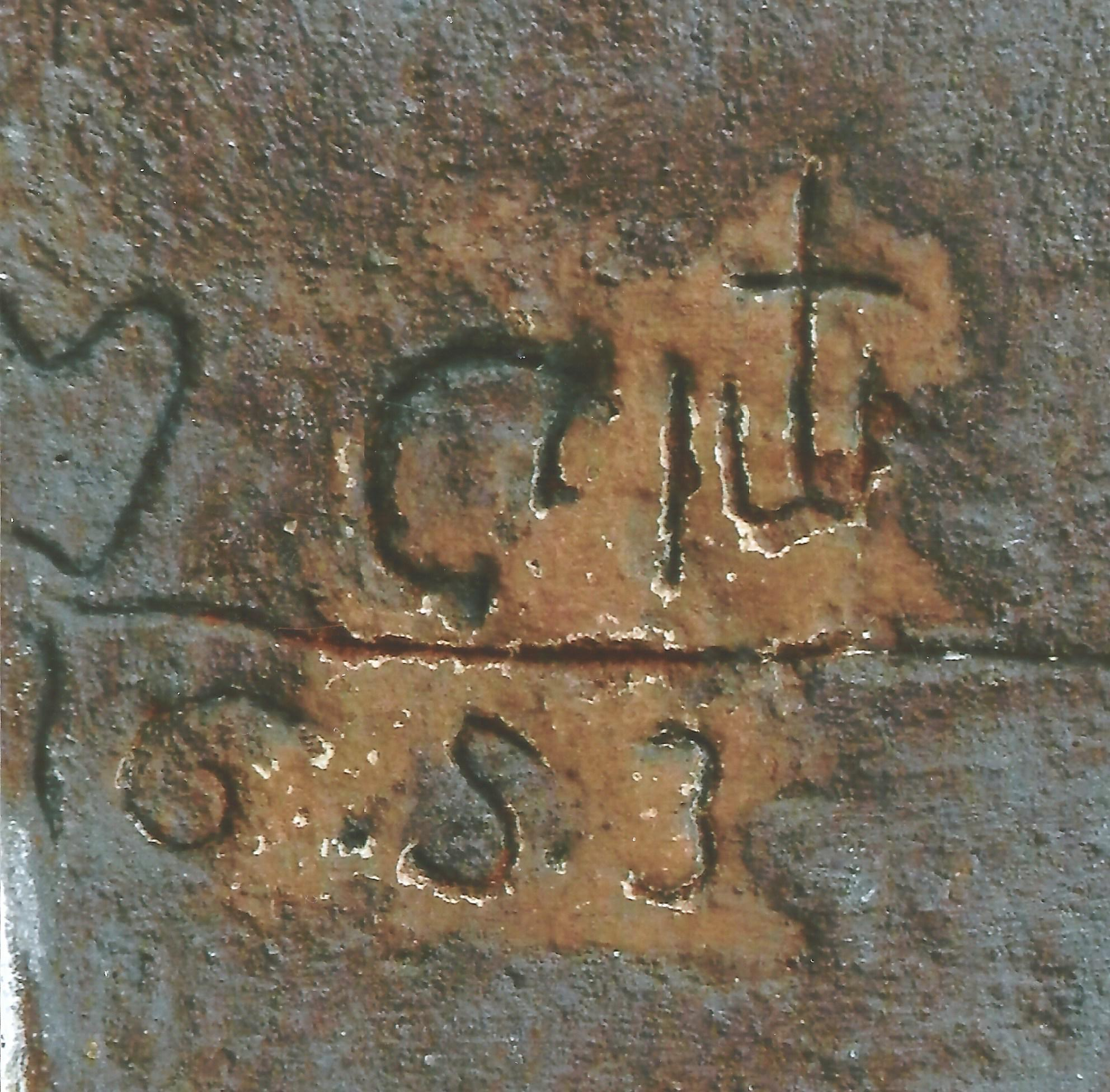 Hauszeichen links des Rathauses auf dem Arnauer Markt an einem Akardenpfeiler ist ein Hauszeichen eingearbeitet. Das Haus war bis 1900 ein Wohnhaus der Gernert in Arnau. 1592 kauften von Waldstein das Haus mit Weinkellern, die Kaufsumme wurde nicht gänzlich gezahlt, evtl. leitet sich so das Wohnrecht der Gernert bis ins 20. Jhrht. her.